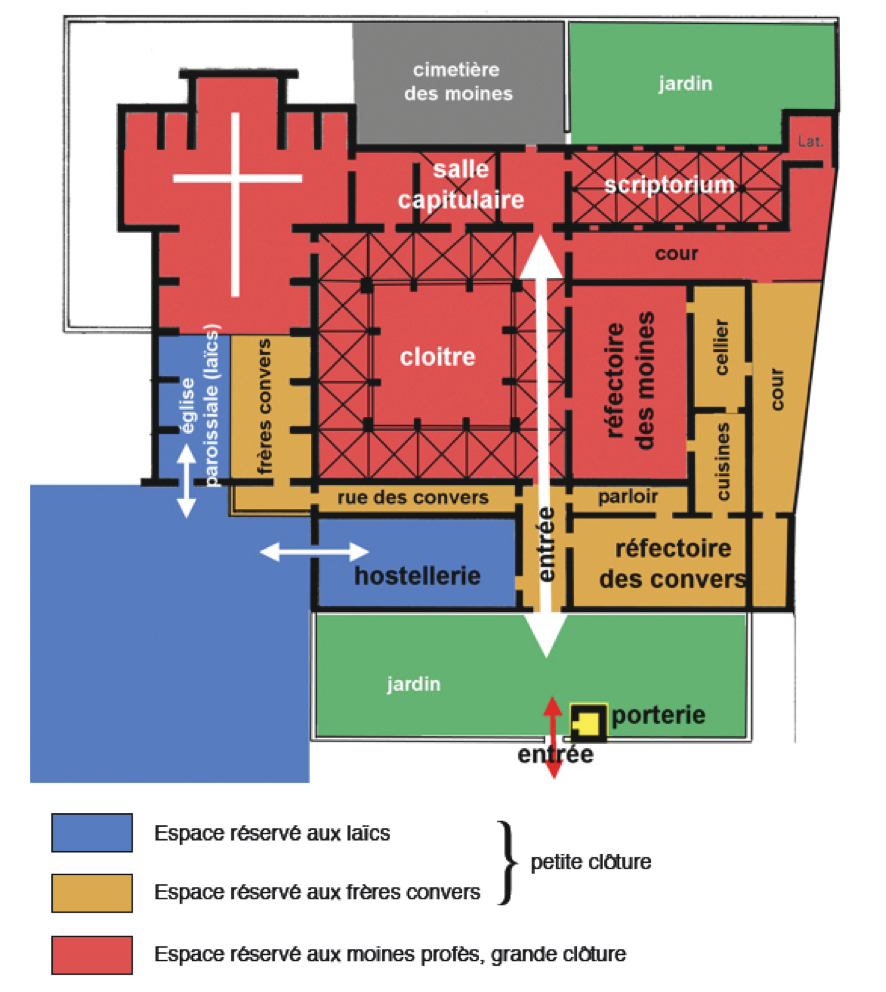 Plan de l'abbaye au XIIIème siècle